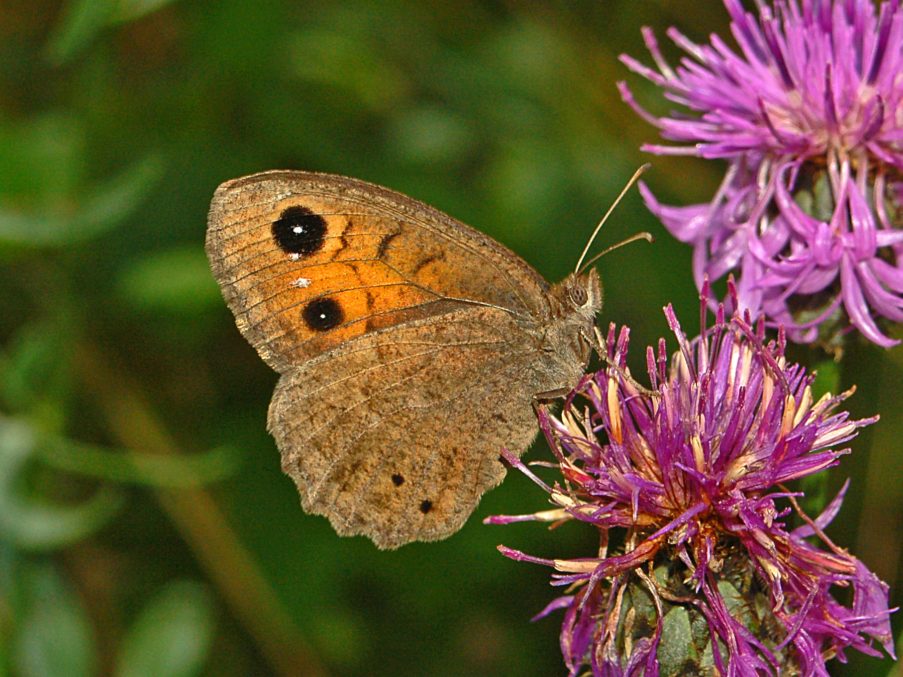 Satyrus ferula, female, ventral view, Val Noci, Genova, Italy